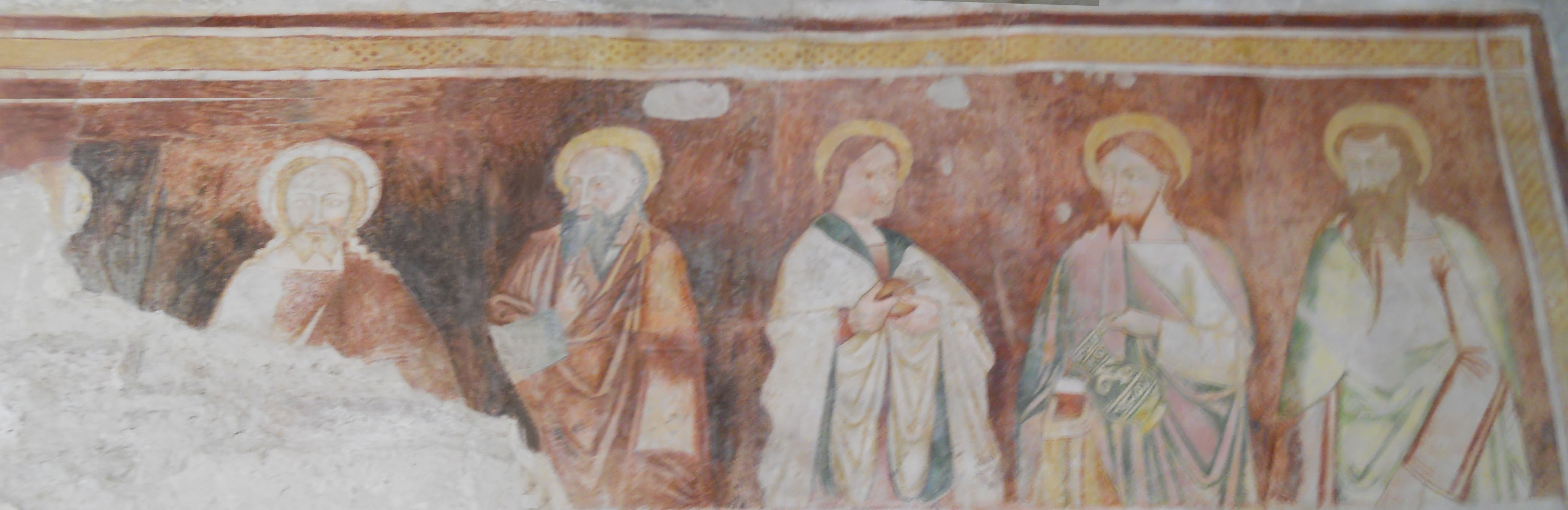 Affresco interno della pieve di San Giorgio di Valpolicella